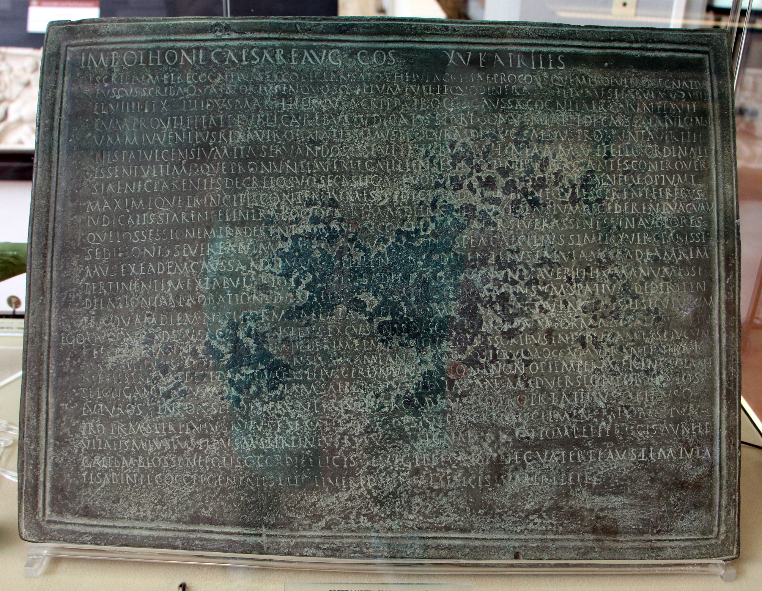 Table Esterzili, inscription découverte à Serri (Sardaigne) et datée de l'empereur Othon (69) references épigraphiques CIL 10, 07852 = D 05947 = Freis 00040 = SRD 00334 = Porra 00939 = AE 1983, 00447 = AE 1989, 00353 = AE 1993, 00836a-b = AE 2000, +00068 = AE 2004, +00123 = AE 2009, +00444